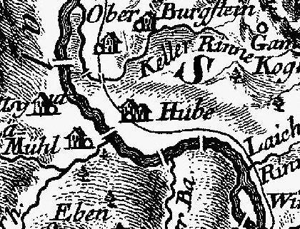 Huben im Ötztal, Ausschnitt aus dem Atlas Tyrolensis von Peter Anich und Blasius Hueber (1774)